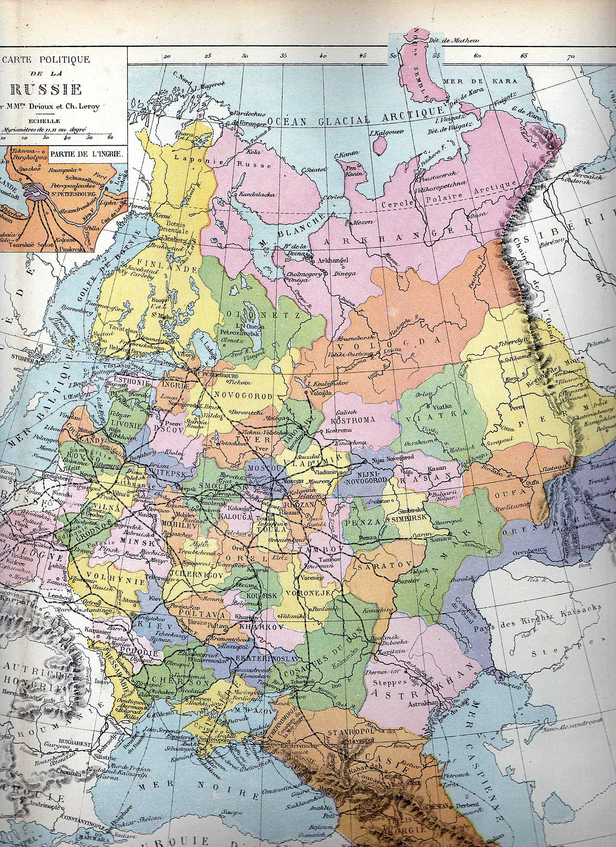 Carte administrative de la Russie d'Europe vers 1880, avec chemins de fer. Atlas universel de géographie Drioux et Leroy, Paris, Librairie Eugène Belin, 1881.